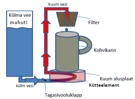 Fail Kaffeemaschine.PNG eestikeelse tekstiga